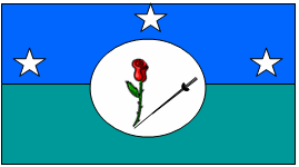 Bandera del Municipio Simón Bolívar (Zulia)